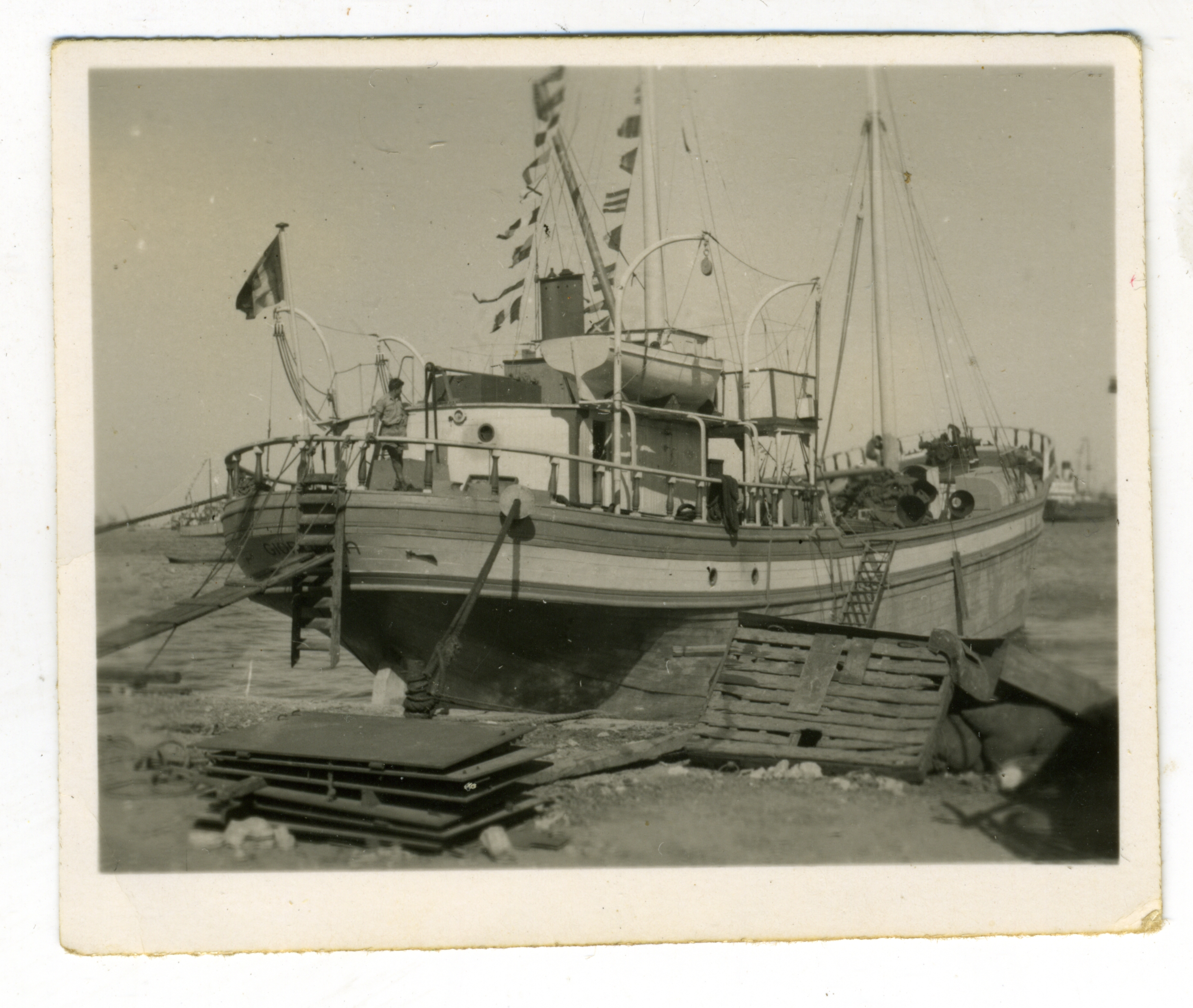 על סיפון אוניית הרכש "ירדנה", נובמבר 1948